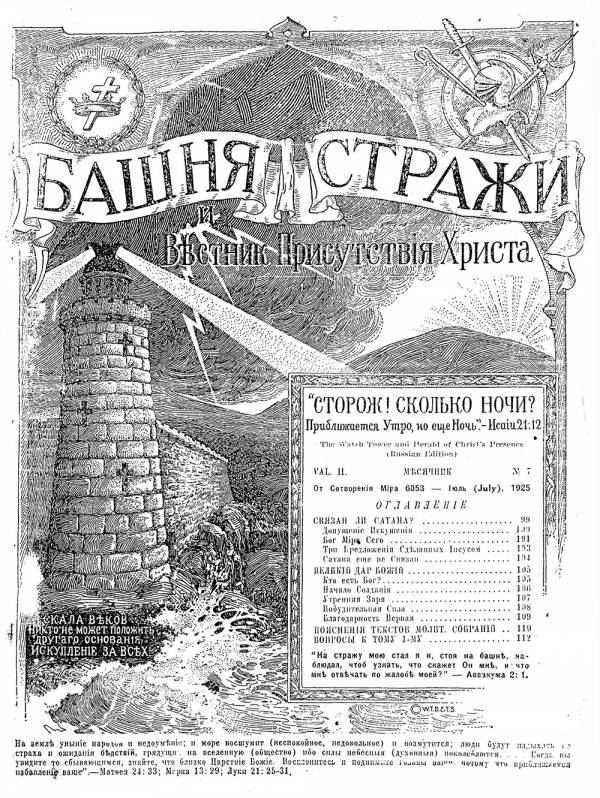 Strażnica w języku rosyjskim wydanie amerykańskie (lipiec 1925)